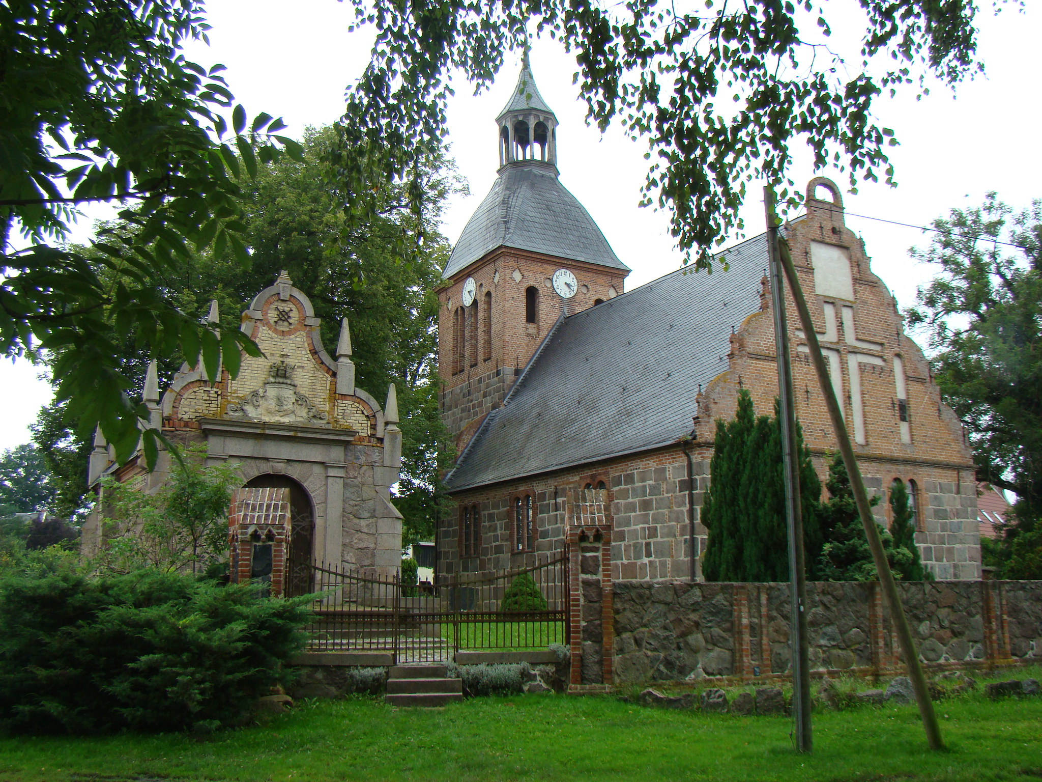 Dorfkirche Bristow mit Mausoleum, Foto: Peter Schmelzle